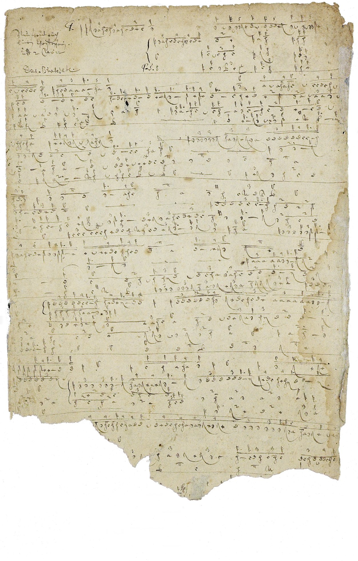 Fragment einer Abschrift von Dietrich Buxtehudes Choralfantasie "Nun freut euch, lieben Christen g'mein" in Tabulatur-Notation durch den jungen Johann Sebastian Bach in Ohrdruf, vielleicht frühestes erhaltenes Bach-Autograph, wiederentdeckt 2006